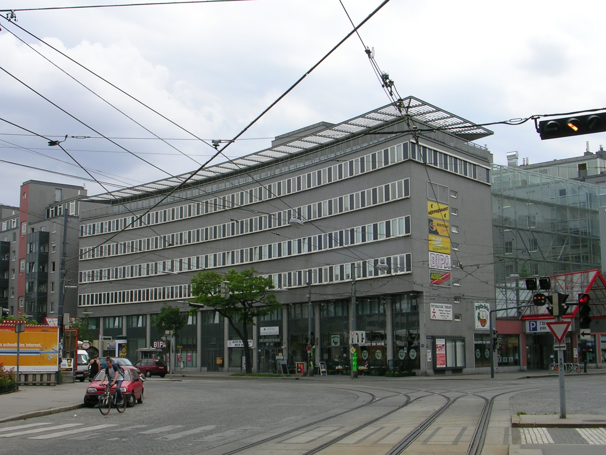 shopping center Höchstädtplatz, Wien-Brigittenau